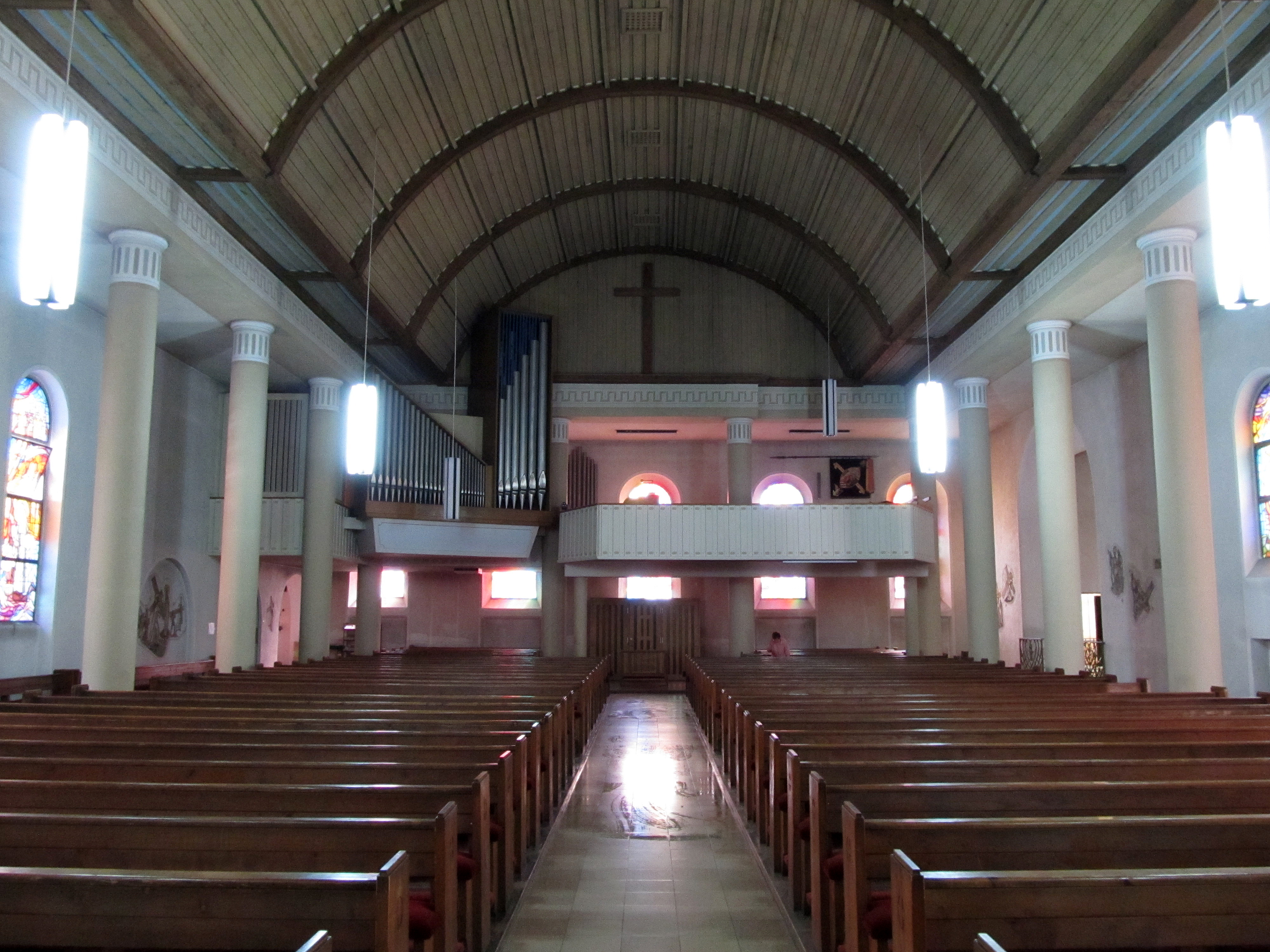 Blick ins Innere der katholischen Pfarrkirche Herz Jesu in Oberwürzbach, Saarland